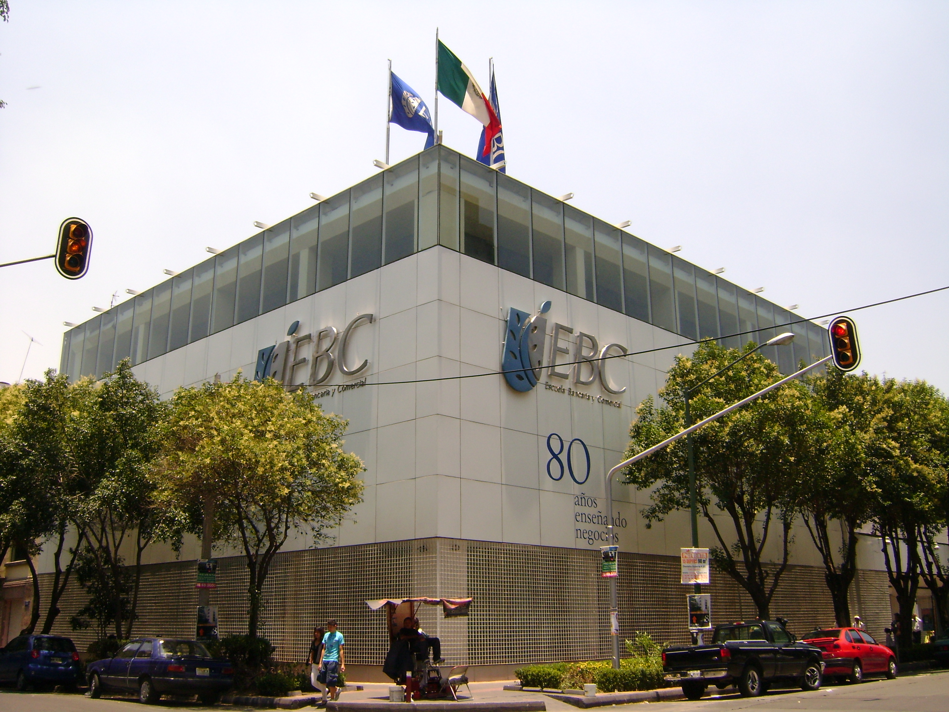 PLANTEL LIVERPOOL DE LA EBC, TOMADA DESDE EL CRUCE DE LAS CALLES DE LIVERPOOL Y DINAMARCA